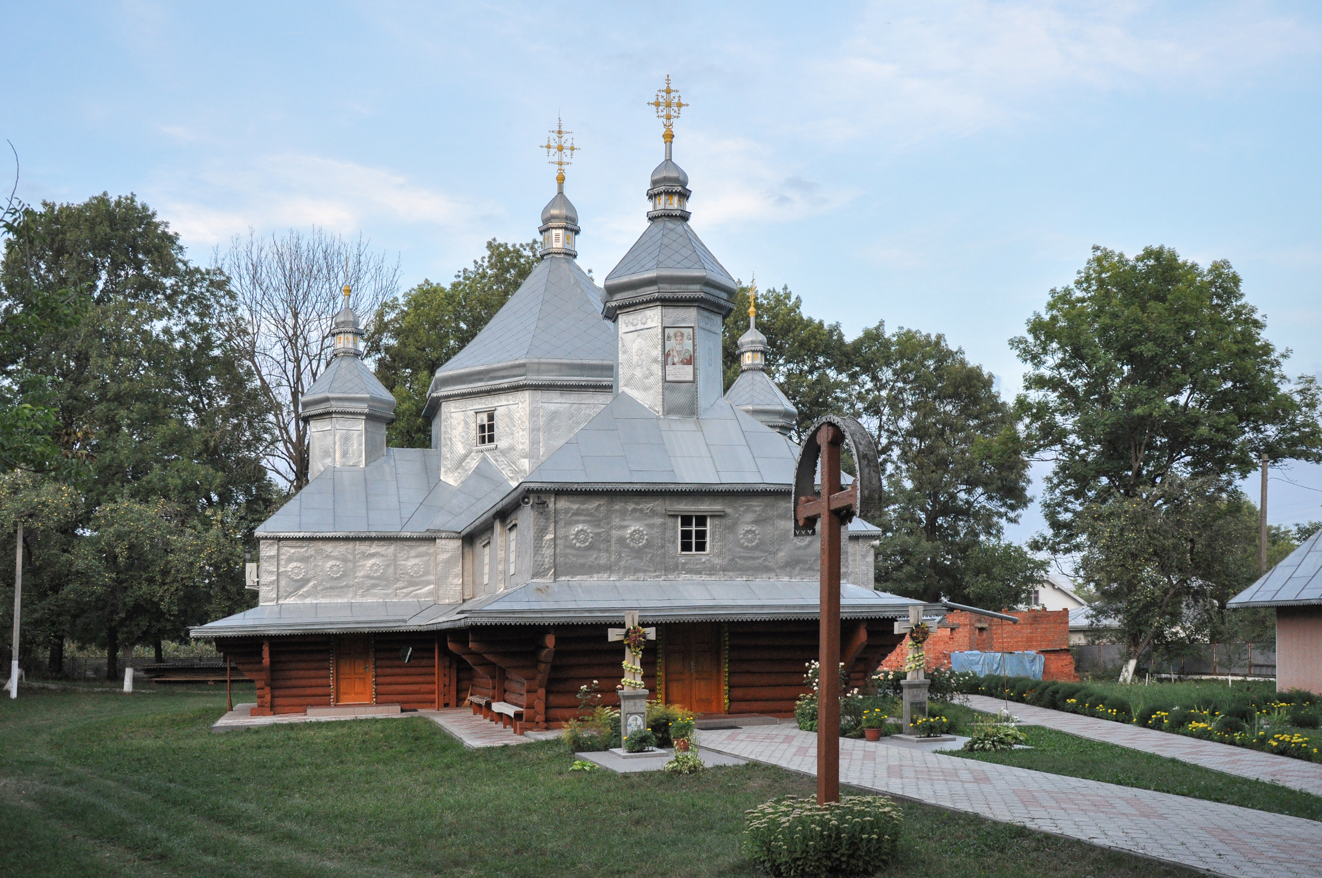 Церква Собору Пресвятої Богородиці (дер.), с. Горішнє Залуччя